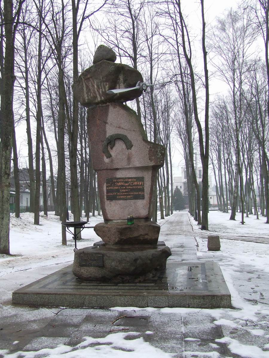 Czarna Białostocka, ul. Parkowa - pomnik ku czci Żwirki i Wigury, z tyłu kościół za parkiem